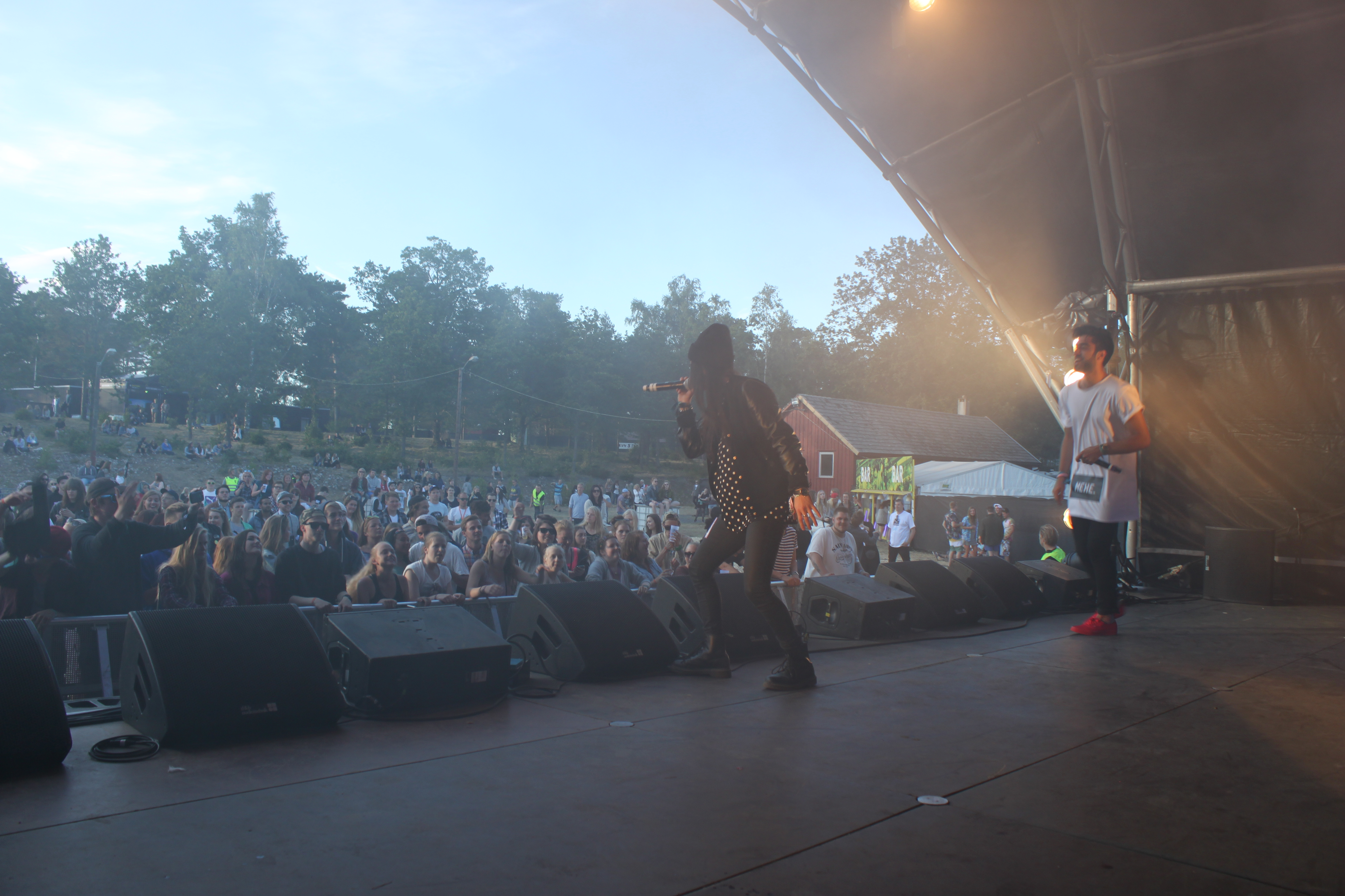 Sara & Arash på Hovefestivalen i 2014